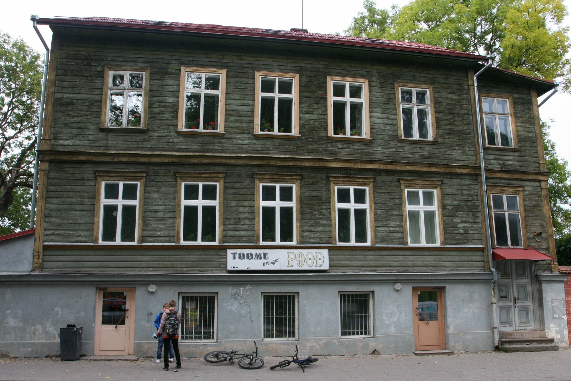 Toome pood Tartus, 17. september 2012. Foto: Lilian Lukka.